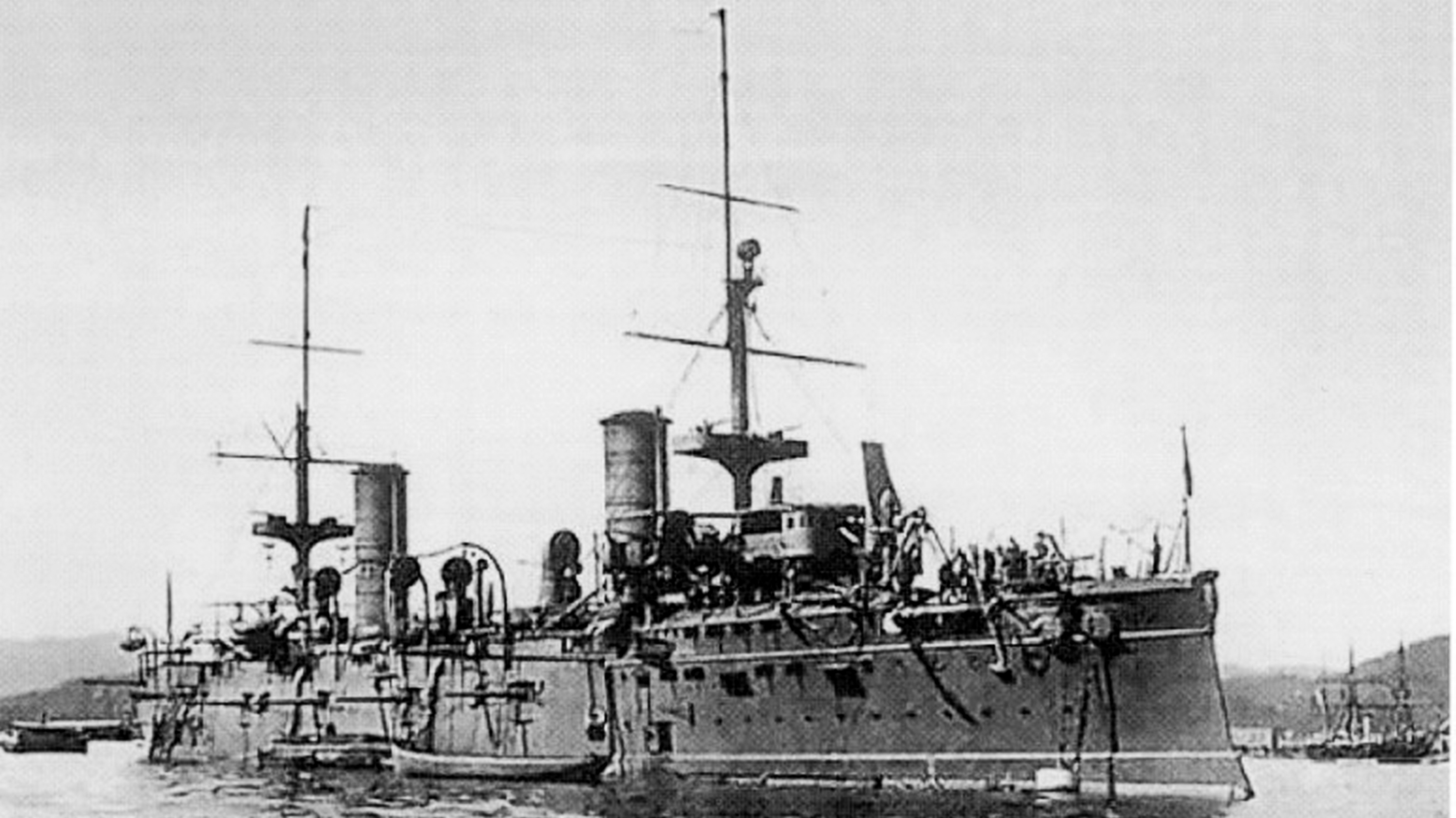 L'Incrociatore corazzato Vettor Pisani in una foto dell'Ufficio storico della Marina Militare